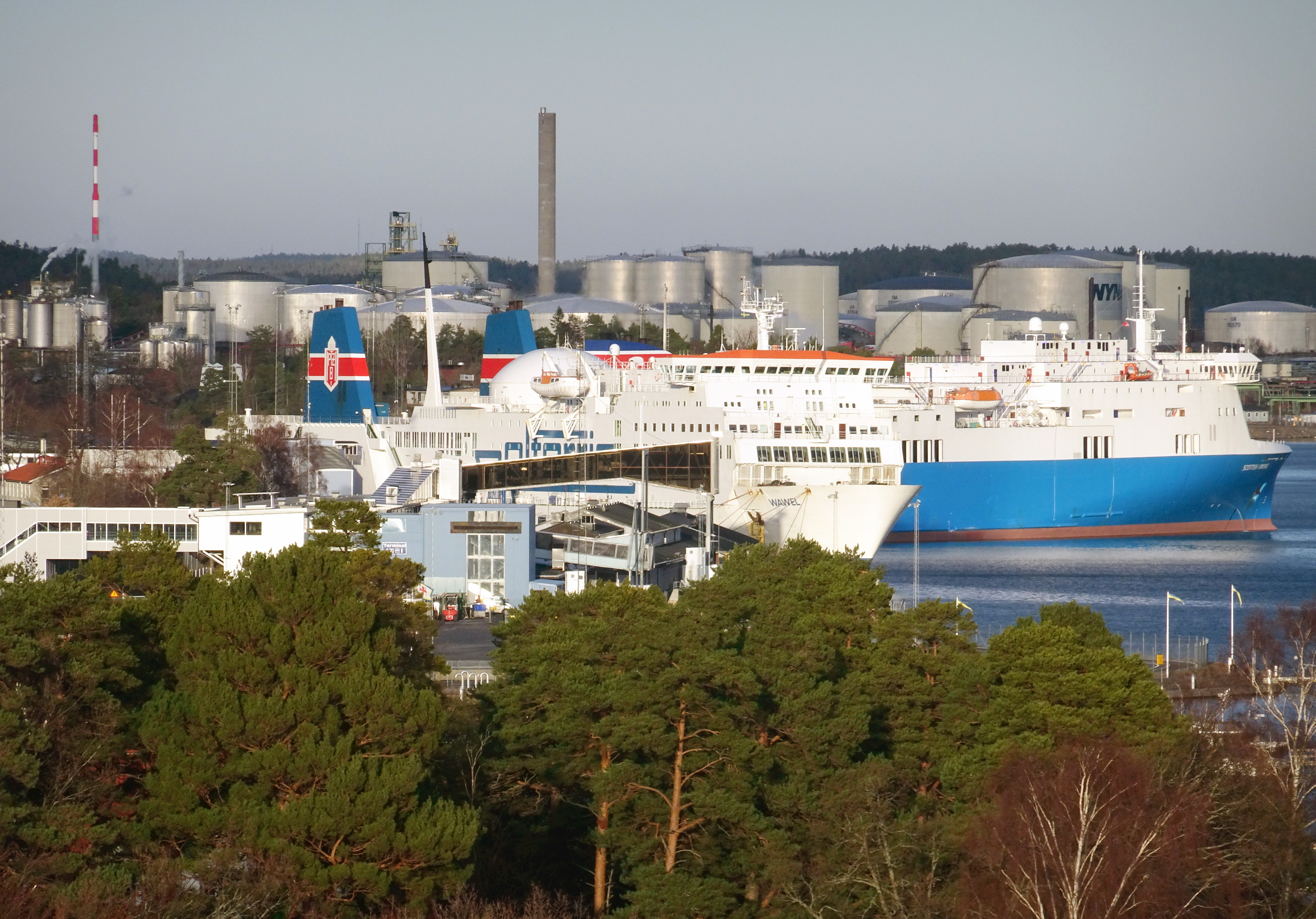 Nynäshamns hamn från gamla vattentornet på Trehörningen